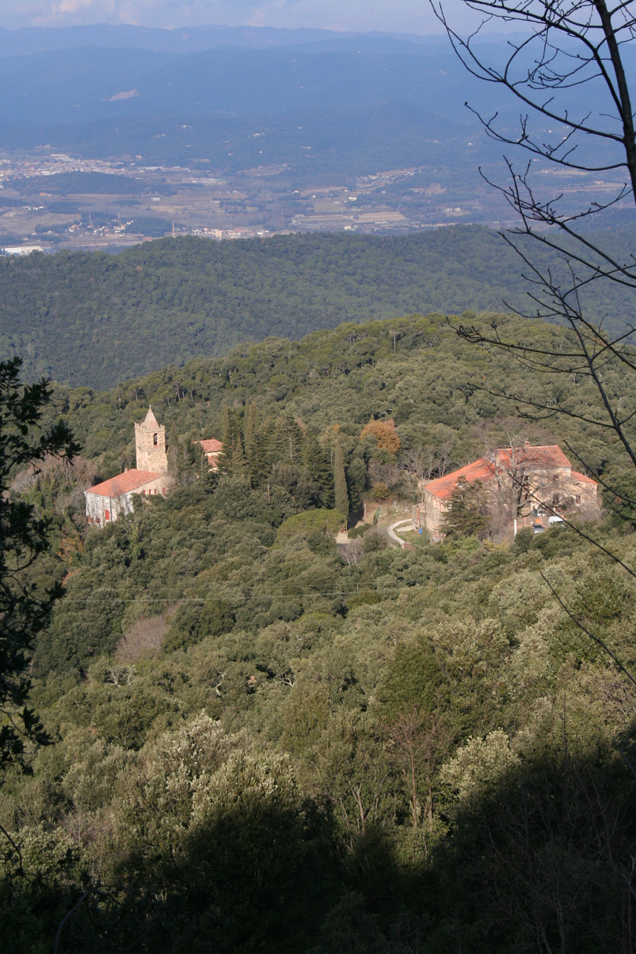 Església de Sant Marti de Montnegre